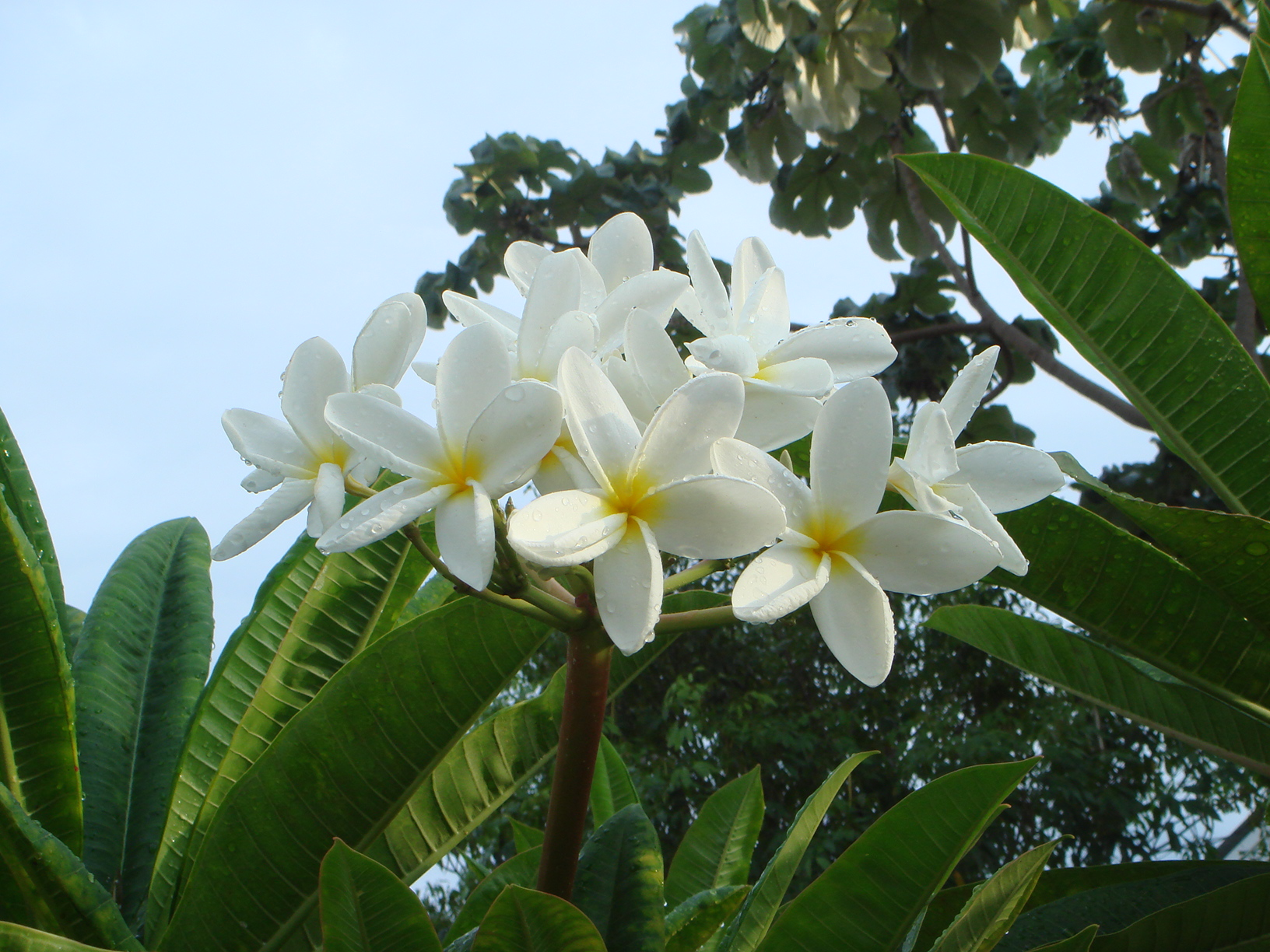 Plumeria rubra var. acutifolia. Varadero, Cuba